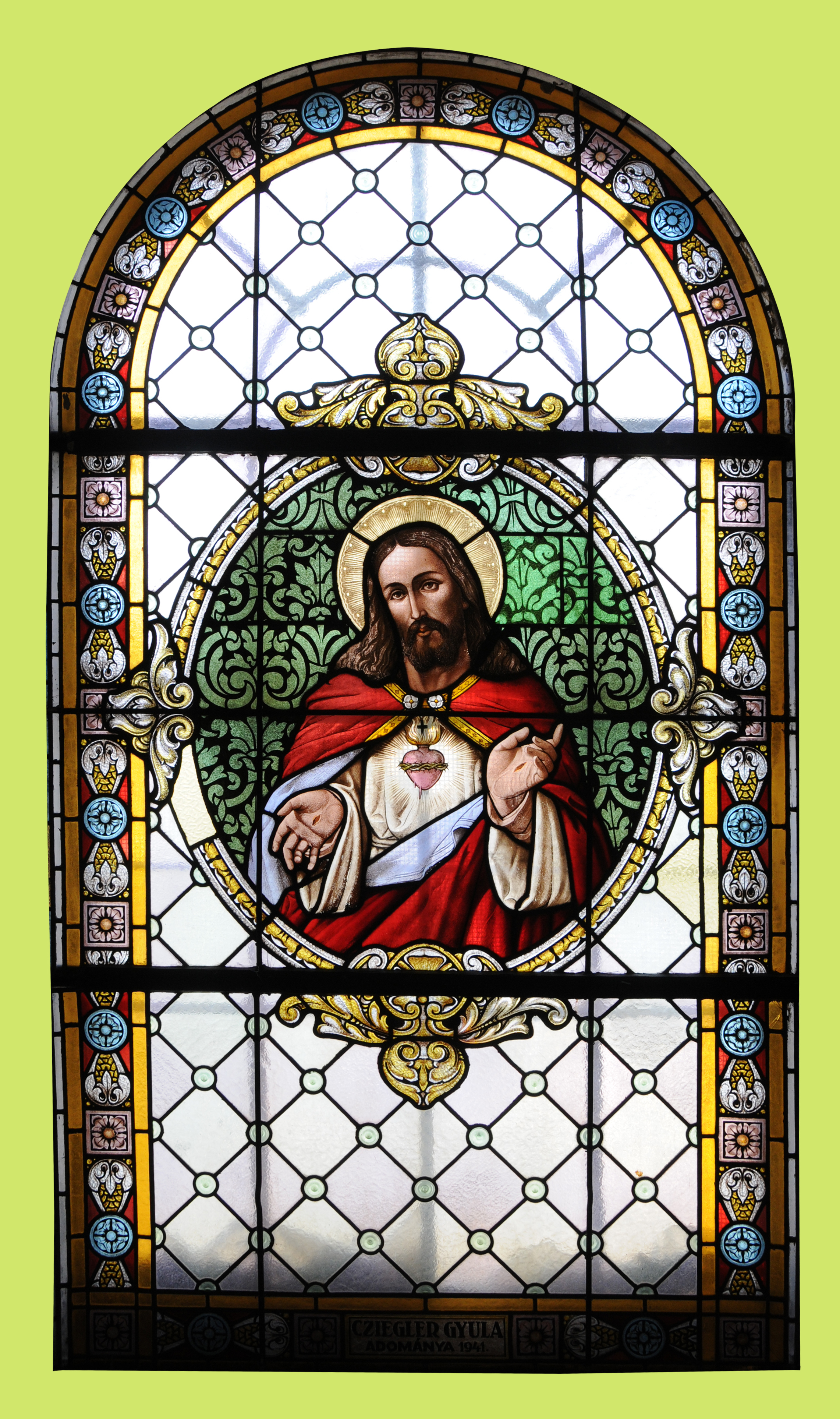 A dunakeszi Szent Mihály-templom festett üvegablaka (Cziegler Gyula adománya, 1941)